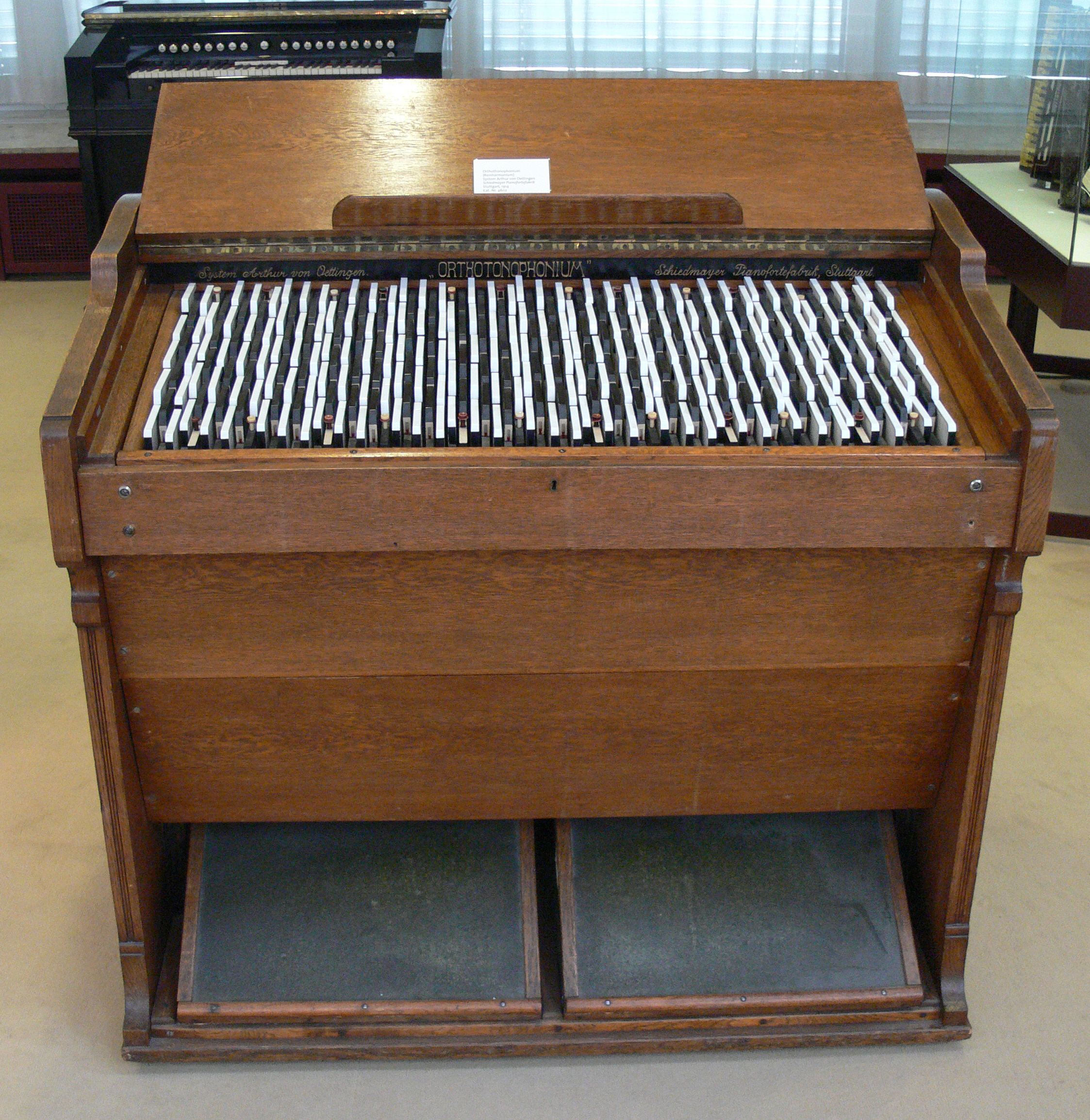 Orthotonophonium (Reinharmonium), System Arthur von Oettingen Schiedmayer Pianofortefabrik, Stuttgart, 1914 Musikinstrumentenmuseum Berlin, Kat.-Nr. 4602